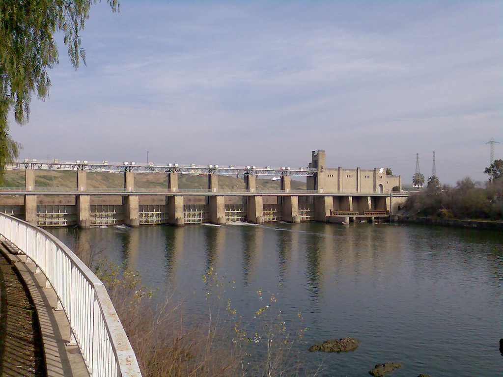 Presa de Alcalá del Río (Sevilla). Fotografía tomada con un teléfono Nokia 6234.